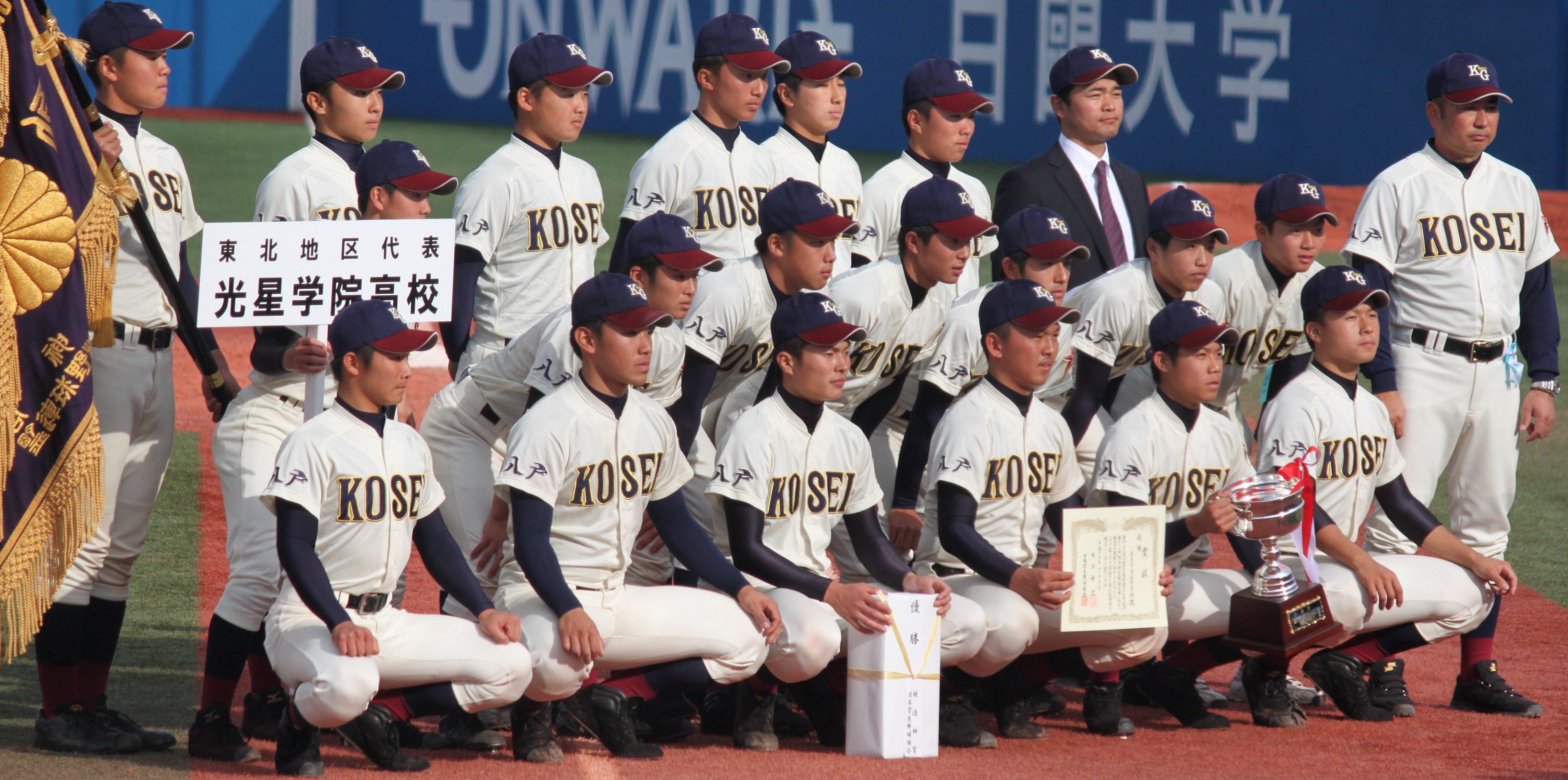 八戸学院光星高等学校野球部